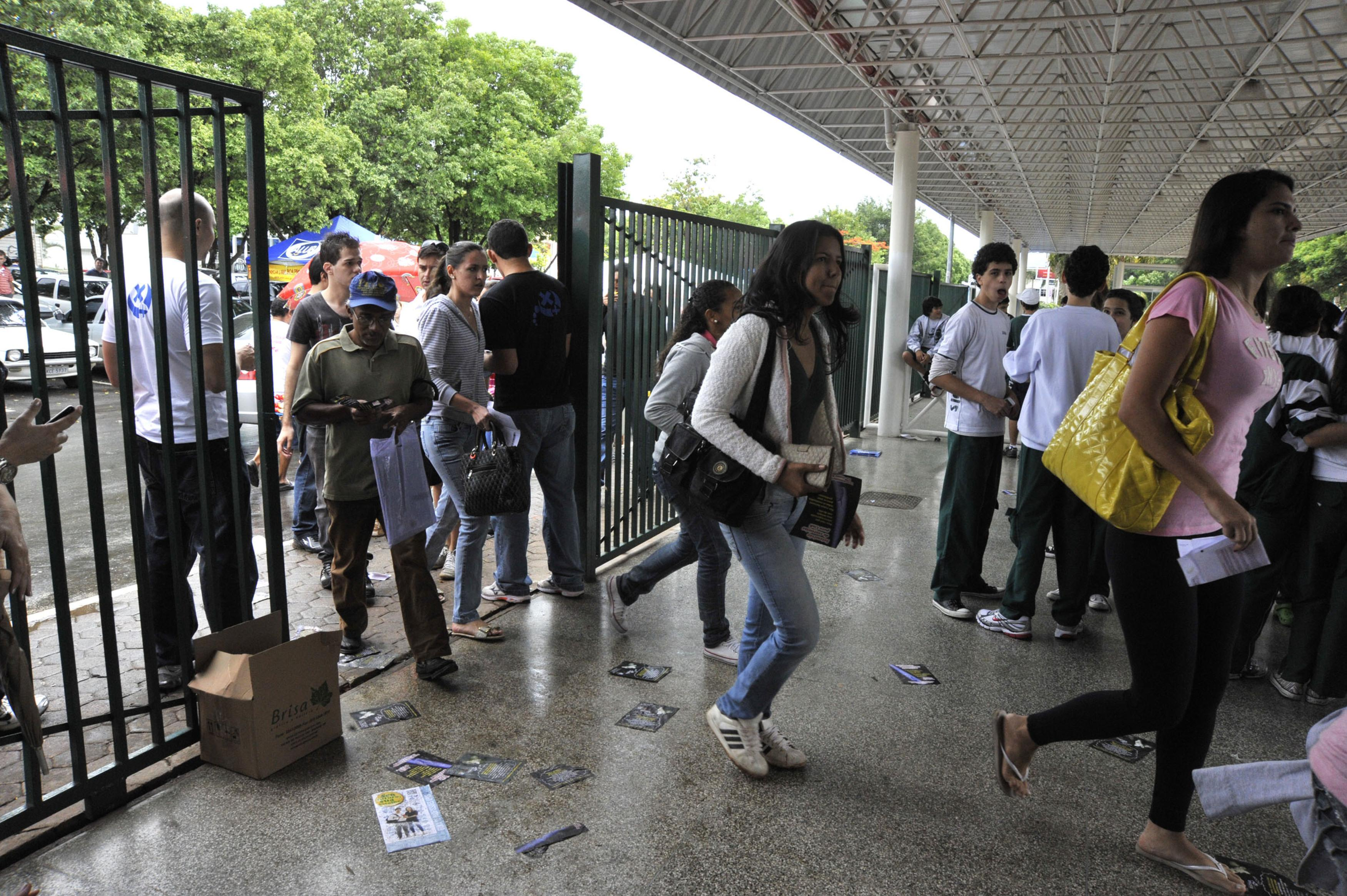 Brasília - Candidatos do Exame Nacional do Ensino Médio (Enem) correm para não perder a prova (José Cruz/ABr)